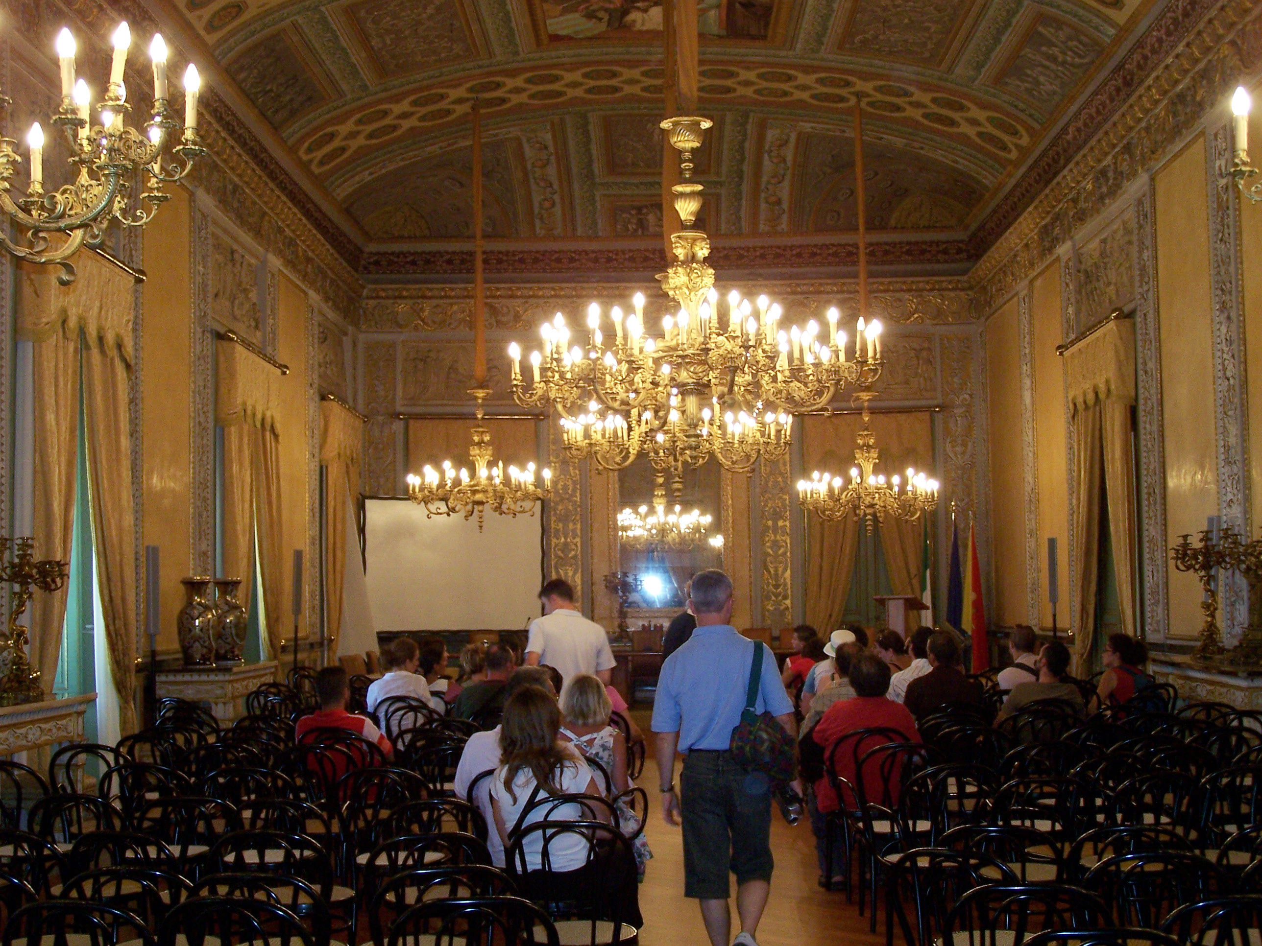 Autore: Peppe64 - Palermo, Sala Gialla di Palazzo dei Normanni, antica residenza reale. Prima fu fortezza punica, romana e bizantina. Poi iniziale residenza degli emiri arabi. Interno: Sala Gialla con gli affreschi di Giuseppe Patania (1830).